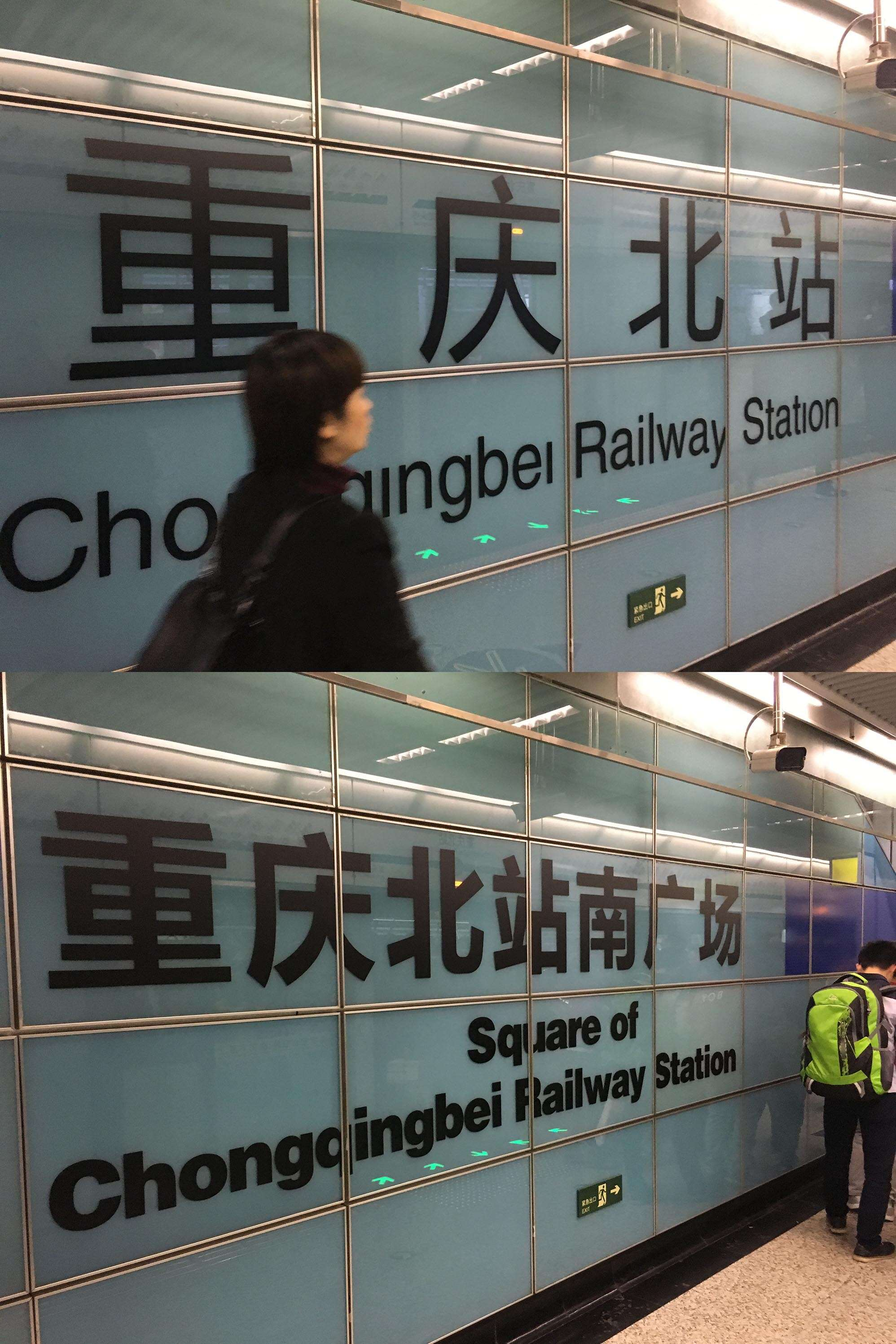 中文（中国大陆）: 三号线重庆北站南广场站大字壁更名前后对比（上图为更名前，下图为更名后）